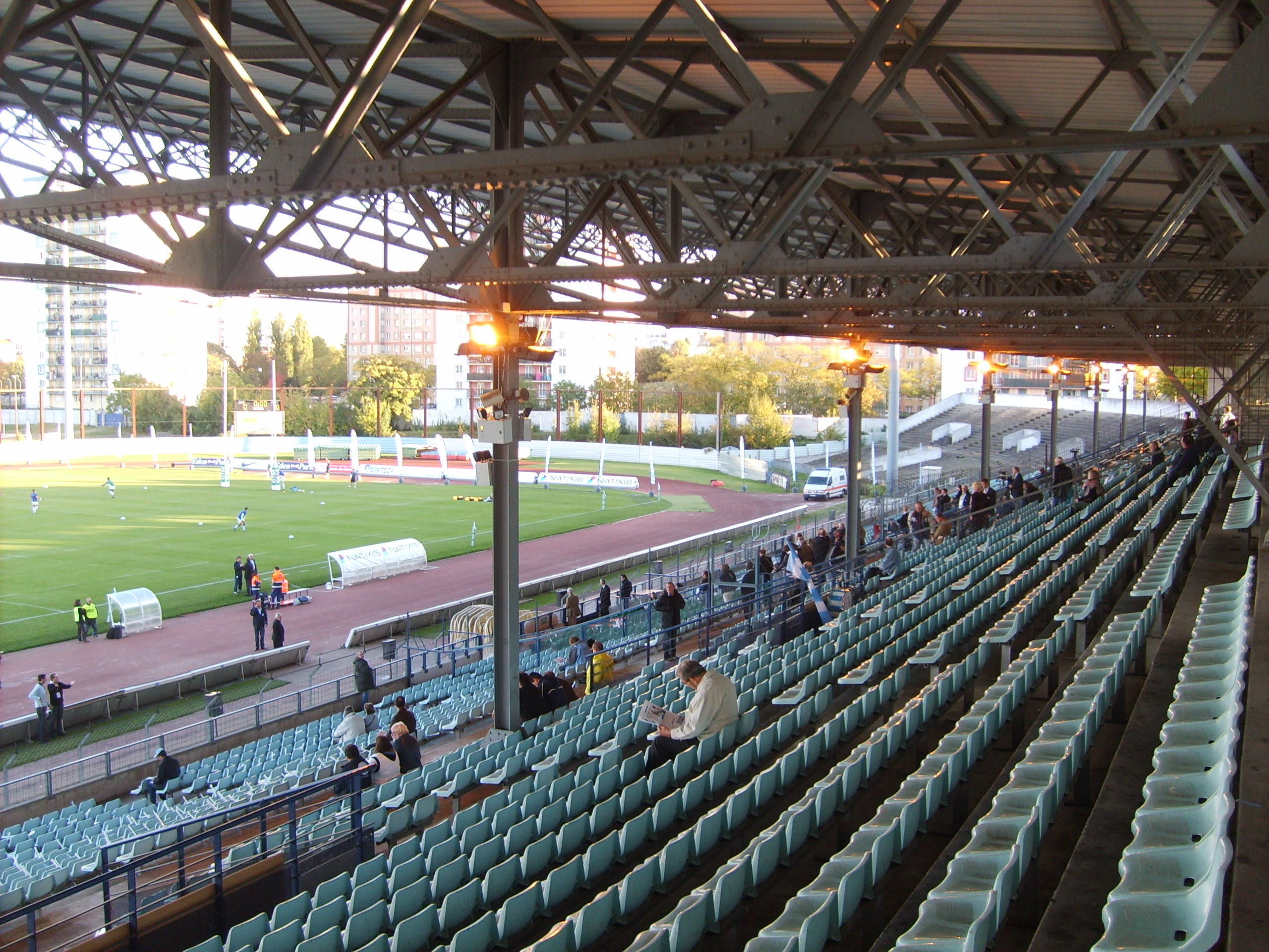 Stade Yves-du-Manoir; (JO 1924) Colombes; Paris; France